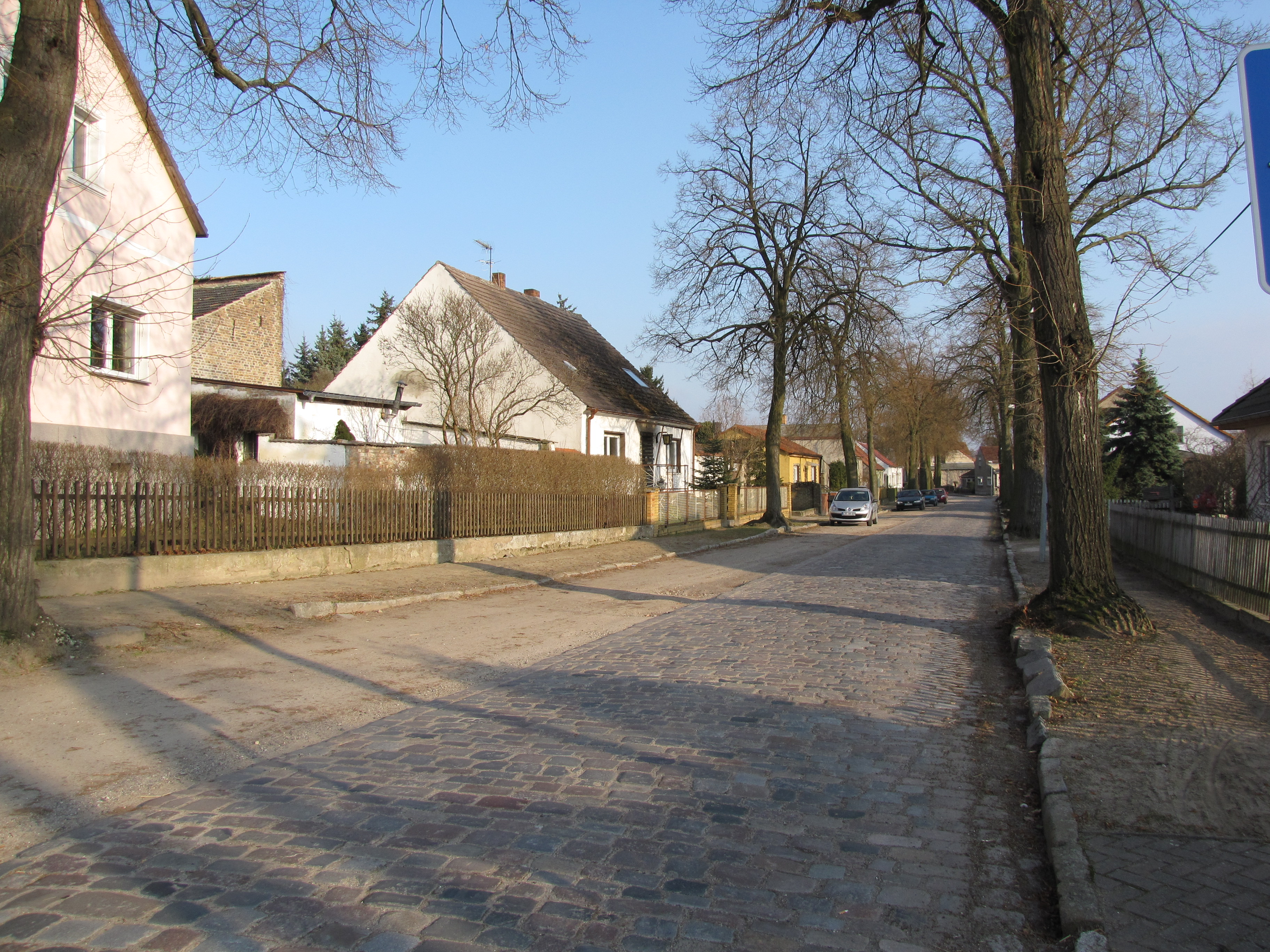 Telz, Ortsteil von Mittenwalde (Mark), Brandenburg, Deutschland, Blick nach Osten in die Feldstraße